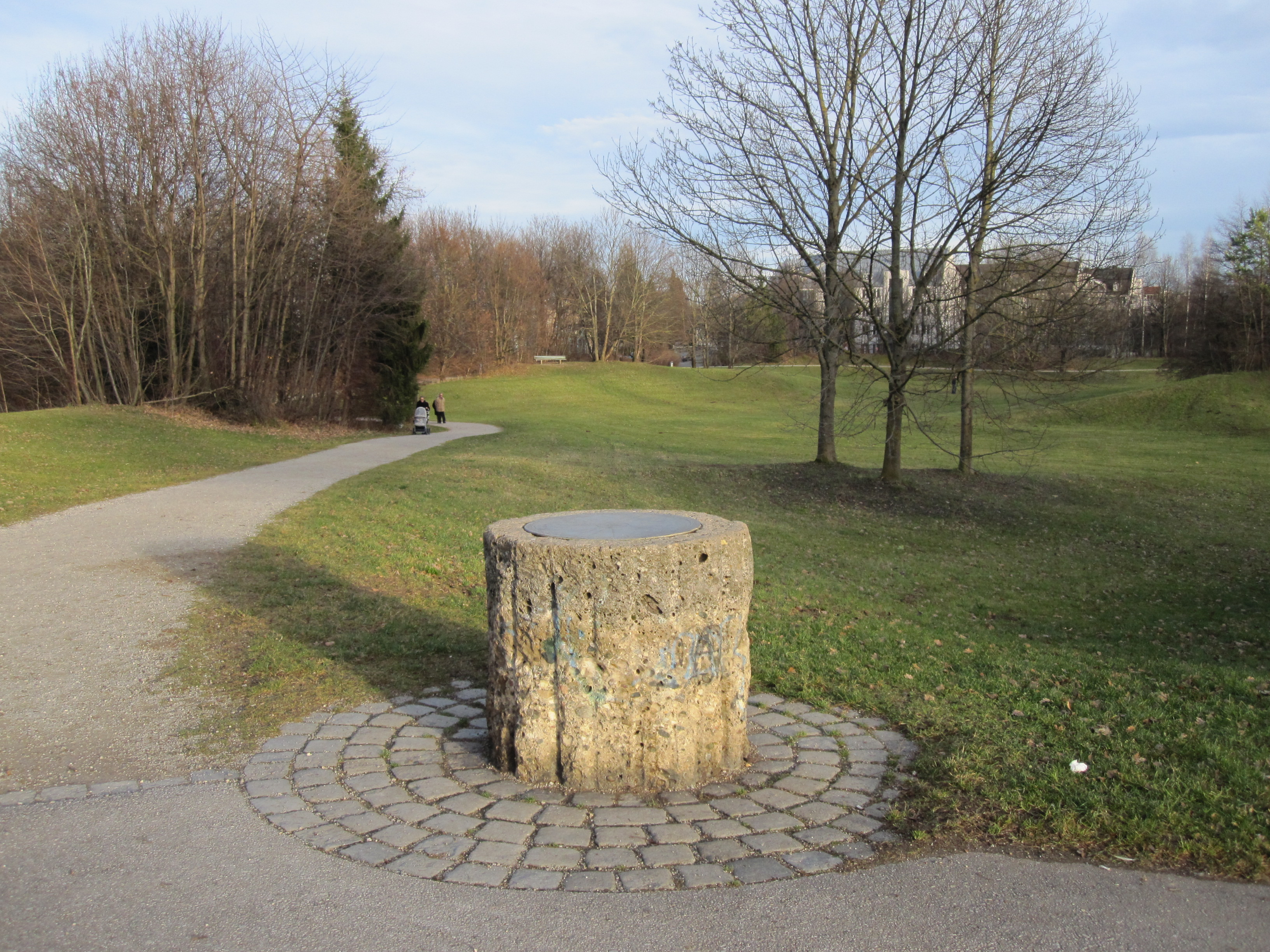 Denninger Anger, Windrose